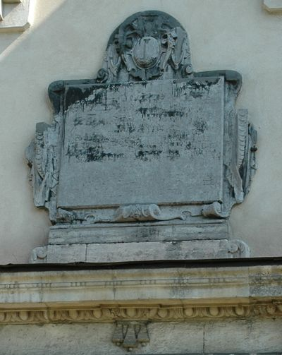 Kościół św. Trójcy w Rakowie - tablica fundacyjna kościoła z 1645